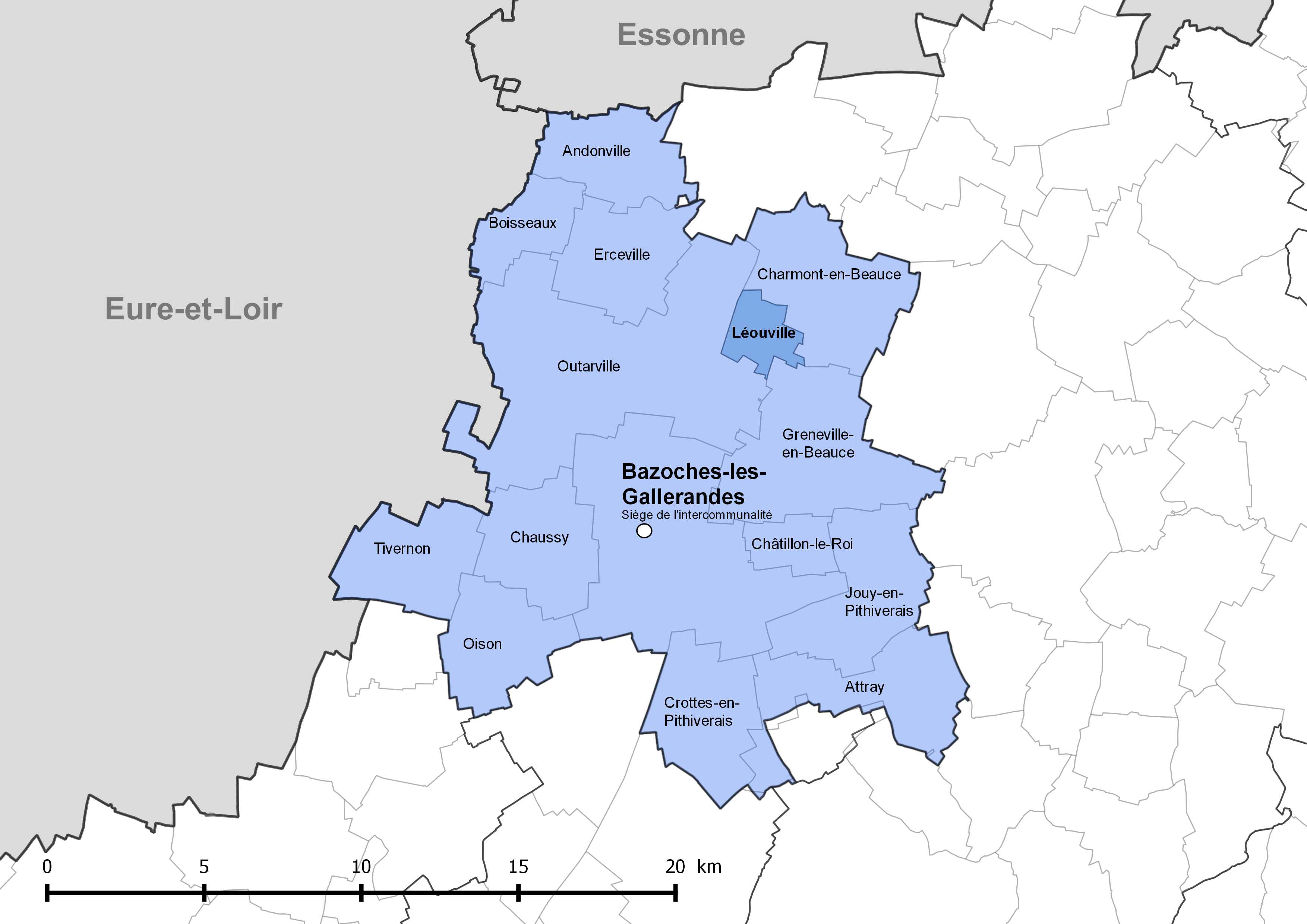 Périmètre de la communauté de communes de la Plaine du Nord Loiret - Situation de la commune de Léouville.